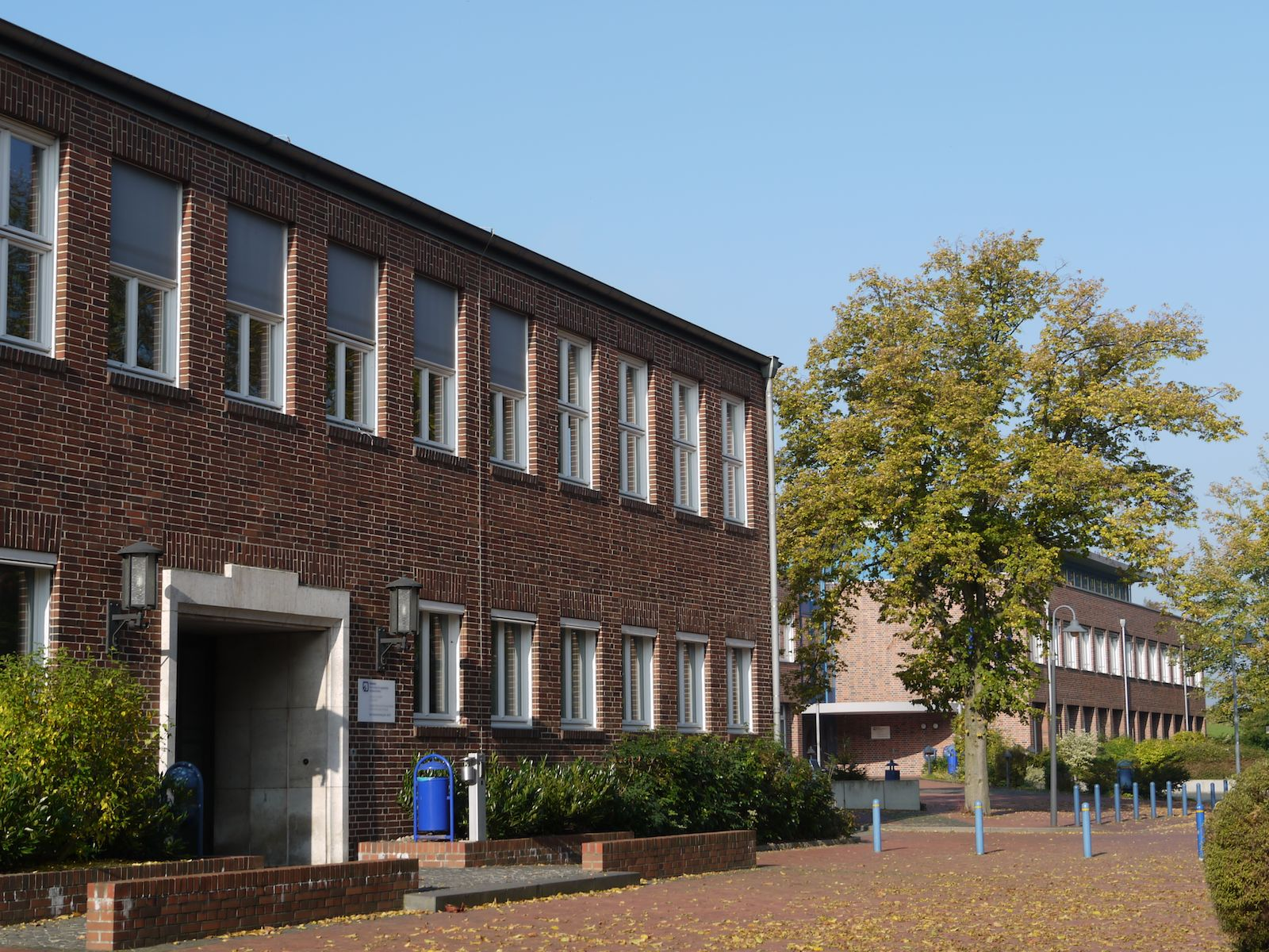 Schachtanlage Hannoversche Treue 2 - links ehemaliges Verwaltungsgebäude, im Hintergrund das Hauptgebäude der Ostfalia-Hochschule für angewandte Wissenschaften